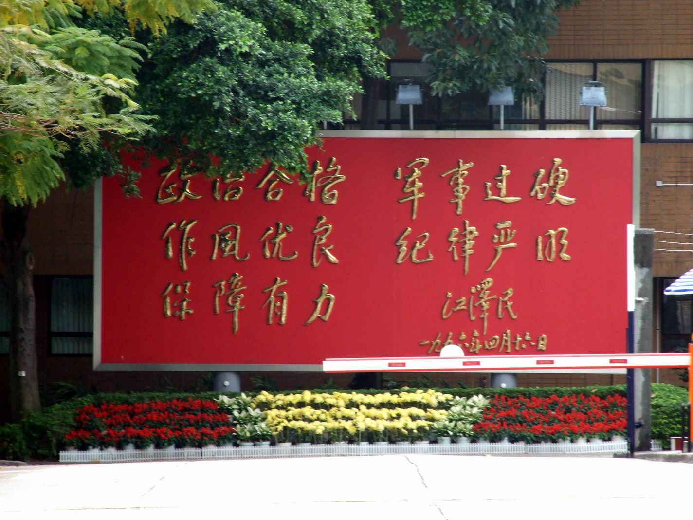 解放軍九龍塘軍營江澤民訓示